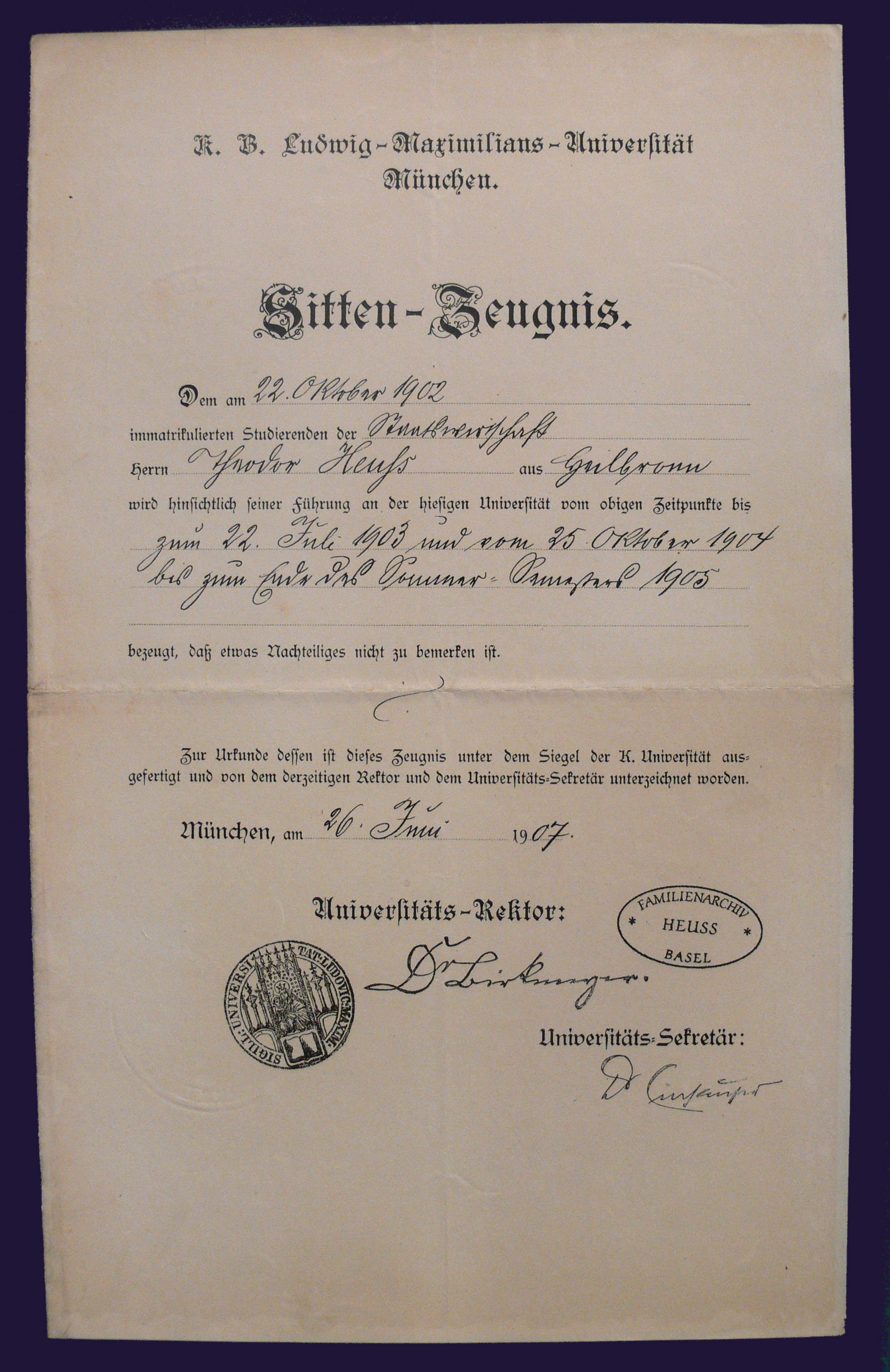 Sittenzeugnis der Ludwig-Maximilians-Universität für ihren Studenten Theodor Heuss; Theodor-Heuss-Haus Stuttgart